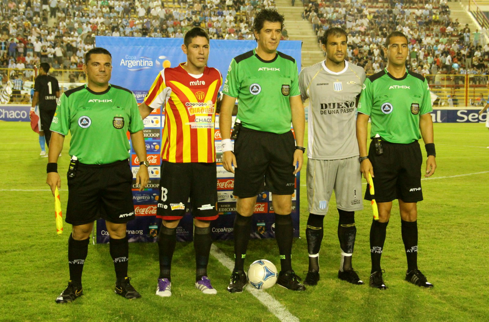 Ambos capitanes; Paulo Centurion (Club Atletico Sarmiento de Resistencia), Sebastian Saja (Racing Club de Avellaneda); Carlos Maglio (arbitro central) junto a sus asistentes; posan para los fotografos minutos antes de iniciar el encuentro a disputarse en el estadio Centenario situado en Resistencia Capital de la Provincia del Chaco